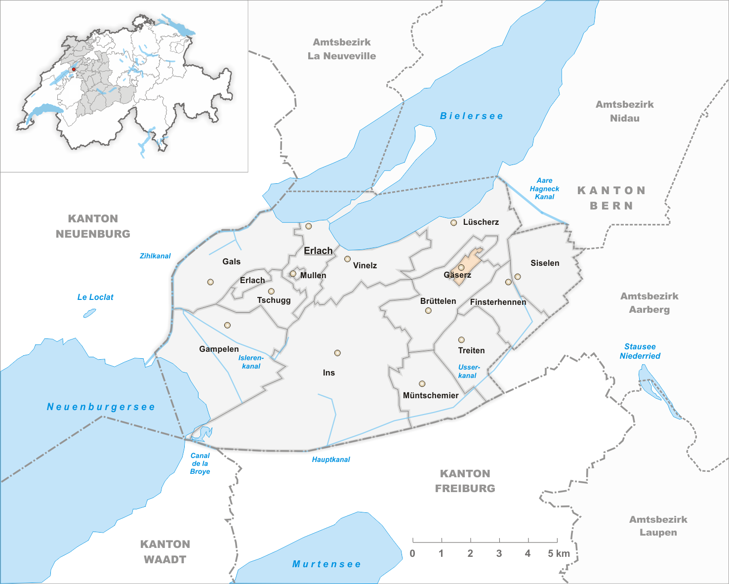 Municipality Gäserz